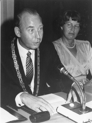 Nieuwerkerk / Oosterland. J. van Bommel. Burgemeester van Duiveland 1979-1986. Met zijn echtgenote, tijdens de installatie te Oosterland.